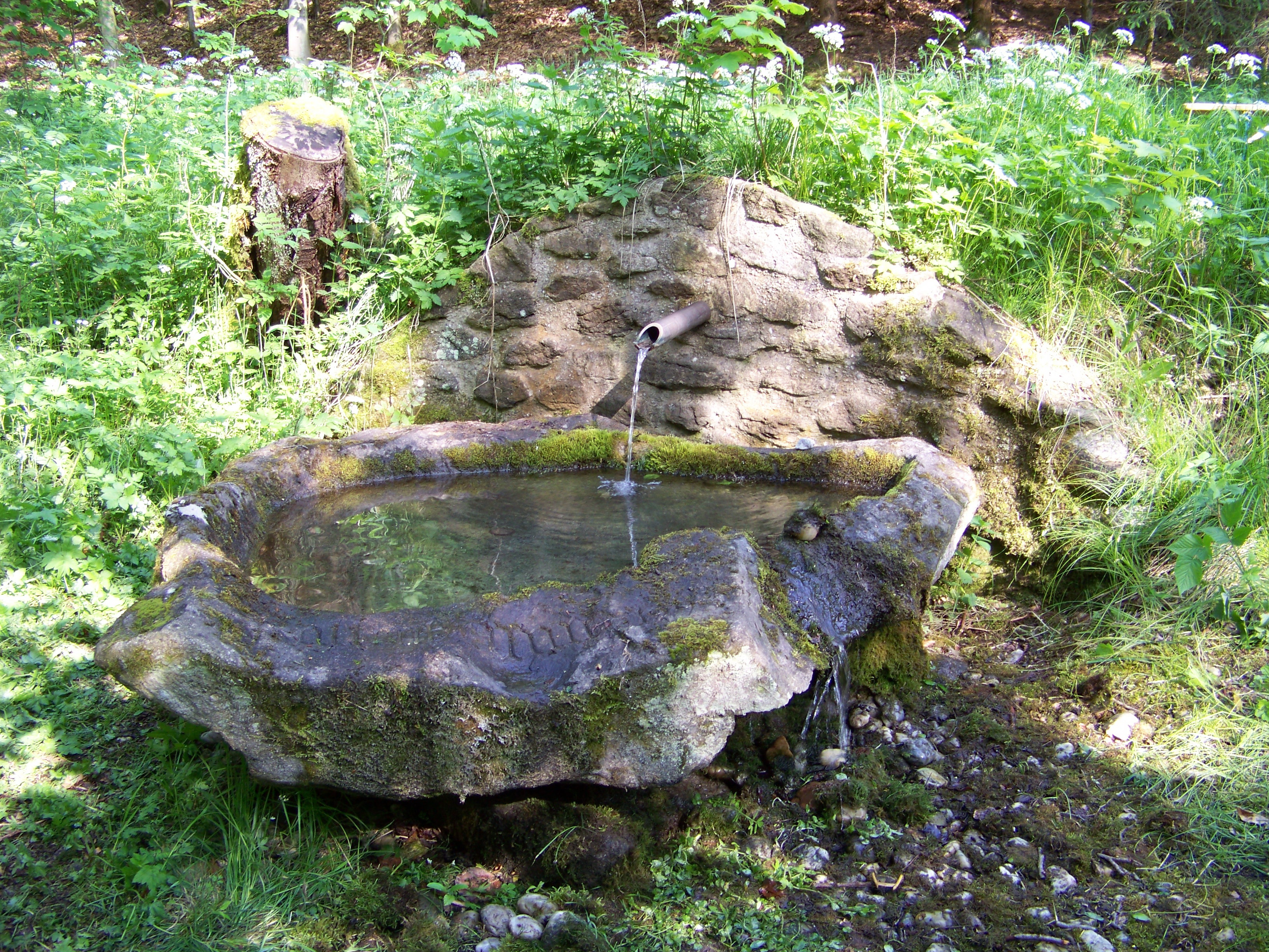 Laberweinting, Hofkirchen, Ellenbach. Rattenbrunn. 1995 wurden durch das Forstamt Mitterfels zwei Quellen des Ellenbachs gefasst. Das Wasser fließt durch ein Bronzerohr in einen großen Steintrog aus Bayerwaldgranit.